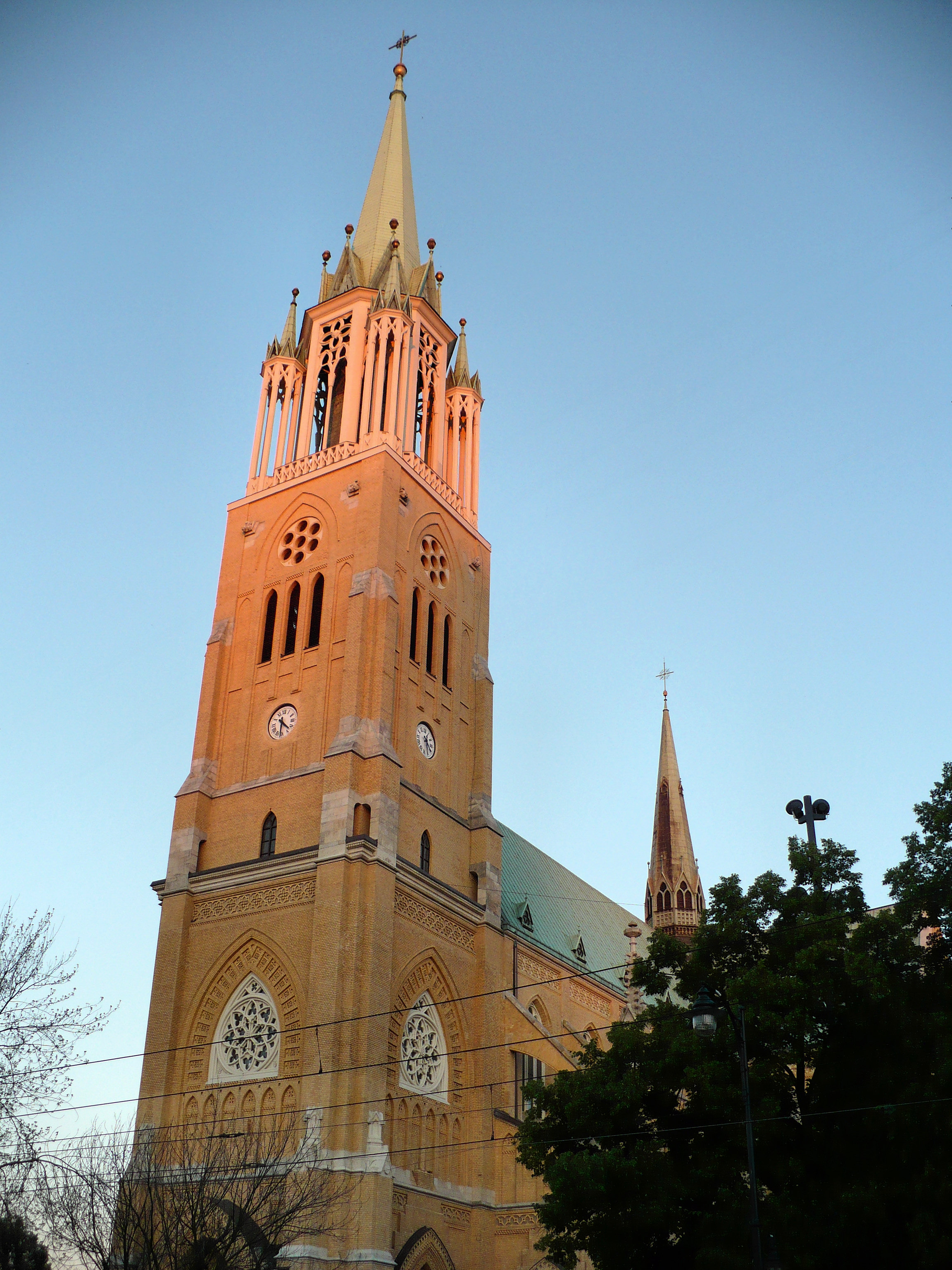 Łódź Katedra św. Stanisława Kostki